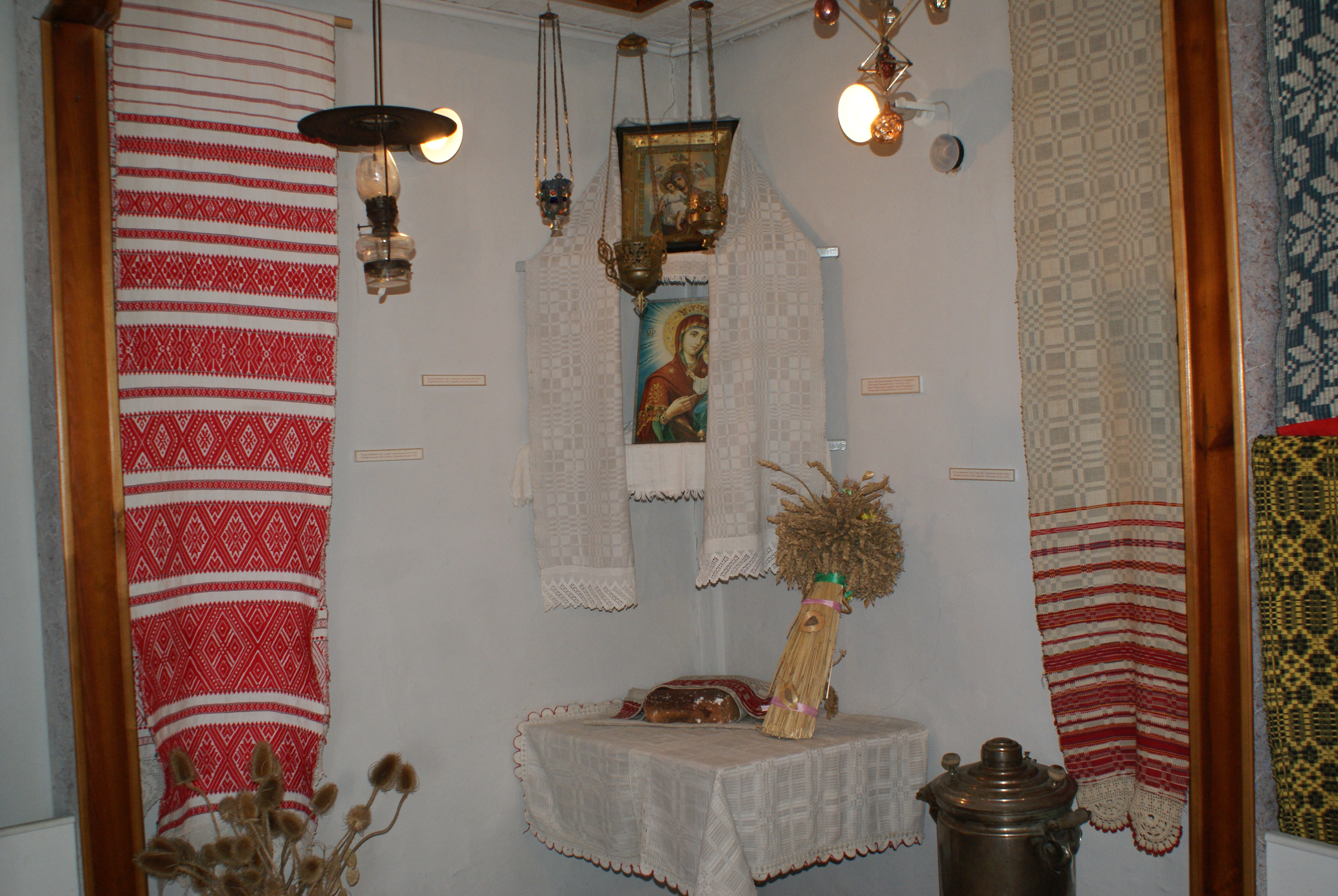 Чырвоны кут у Слуцкім этнаграфічным музеі